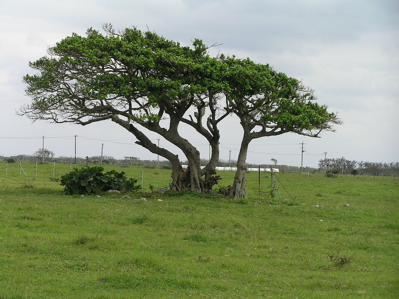 黒島の大木